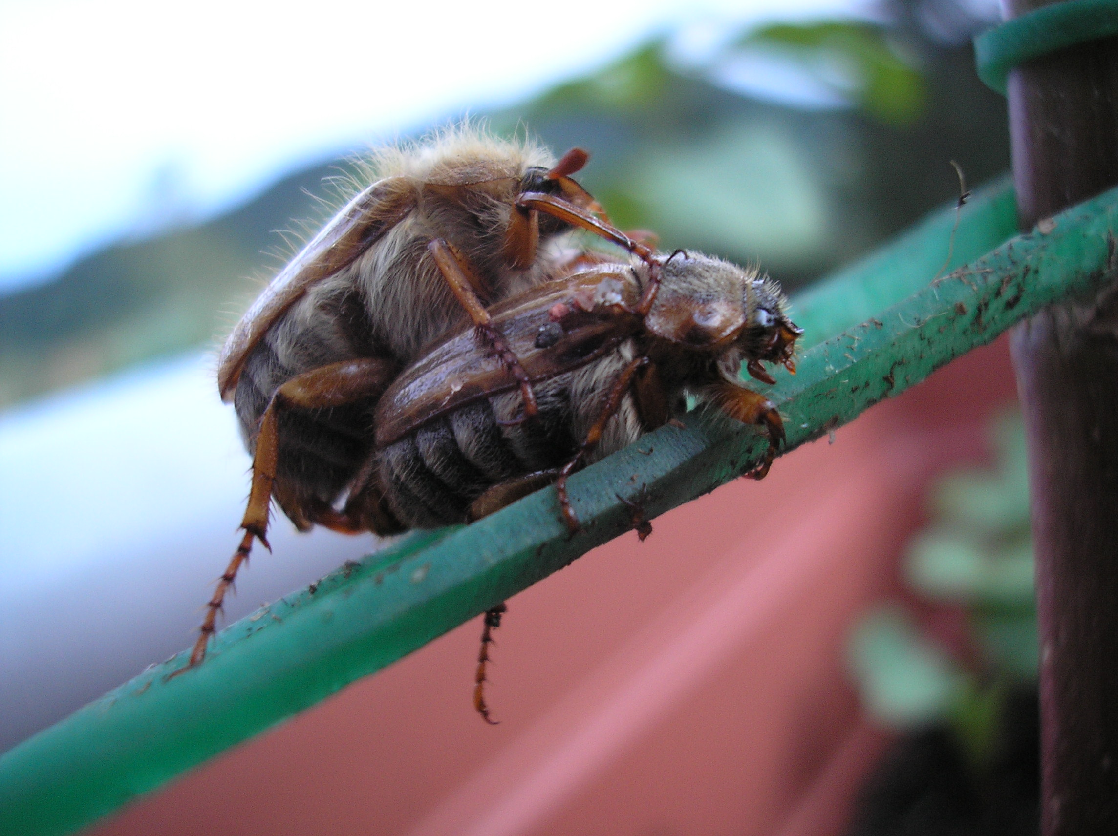 Junikäfer bei Paarung